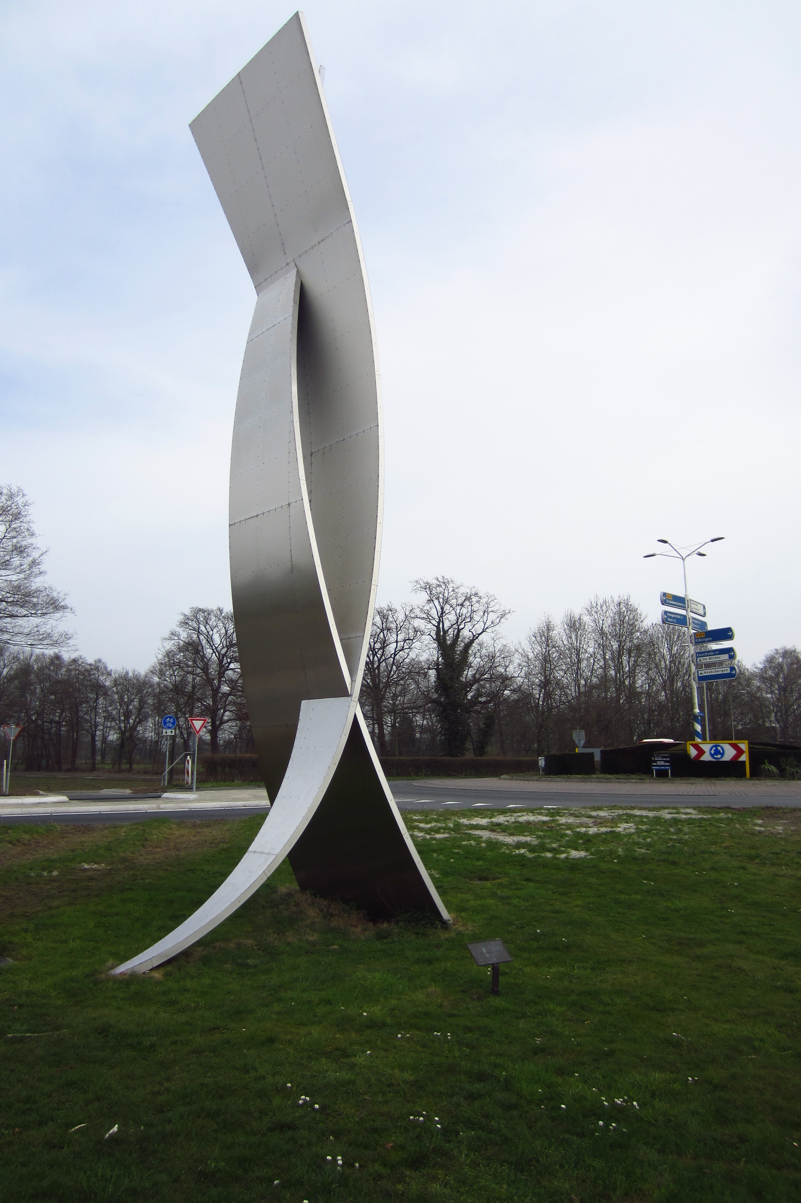 "Spankracht" (1995), sculptuur van Hans Morselt (1929-2014) bij de rotonde aan het begin van N347 bij Haaksbergen.